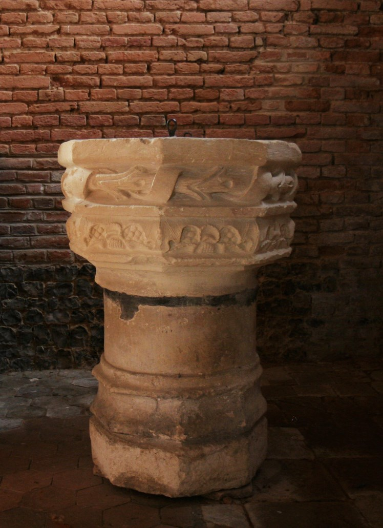 Les fonts baptismaux (XIIIè siècle)